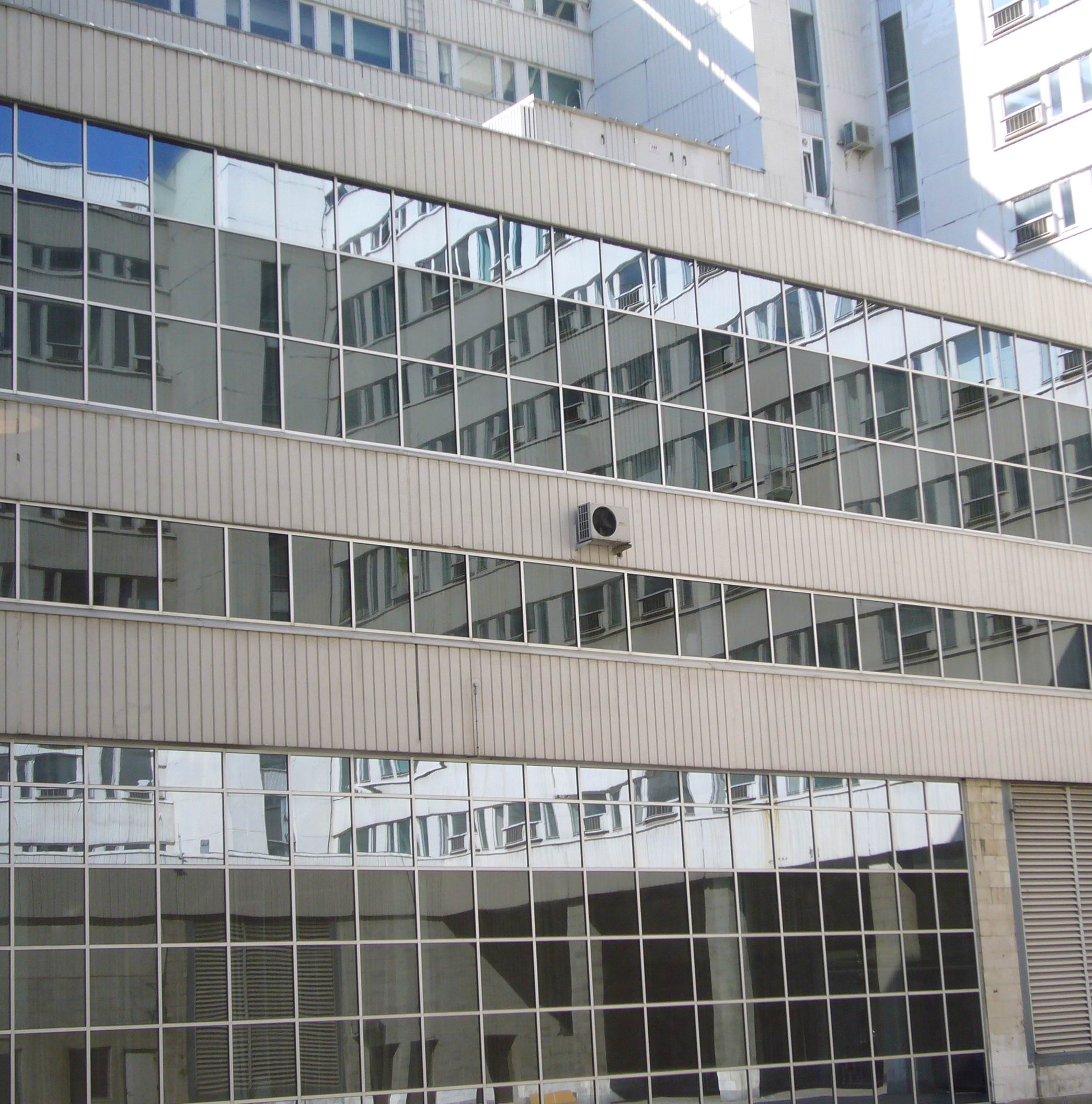 Отель "Аэростар" в Москве